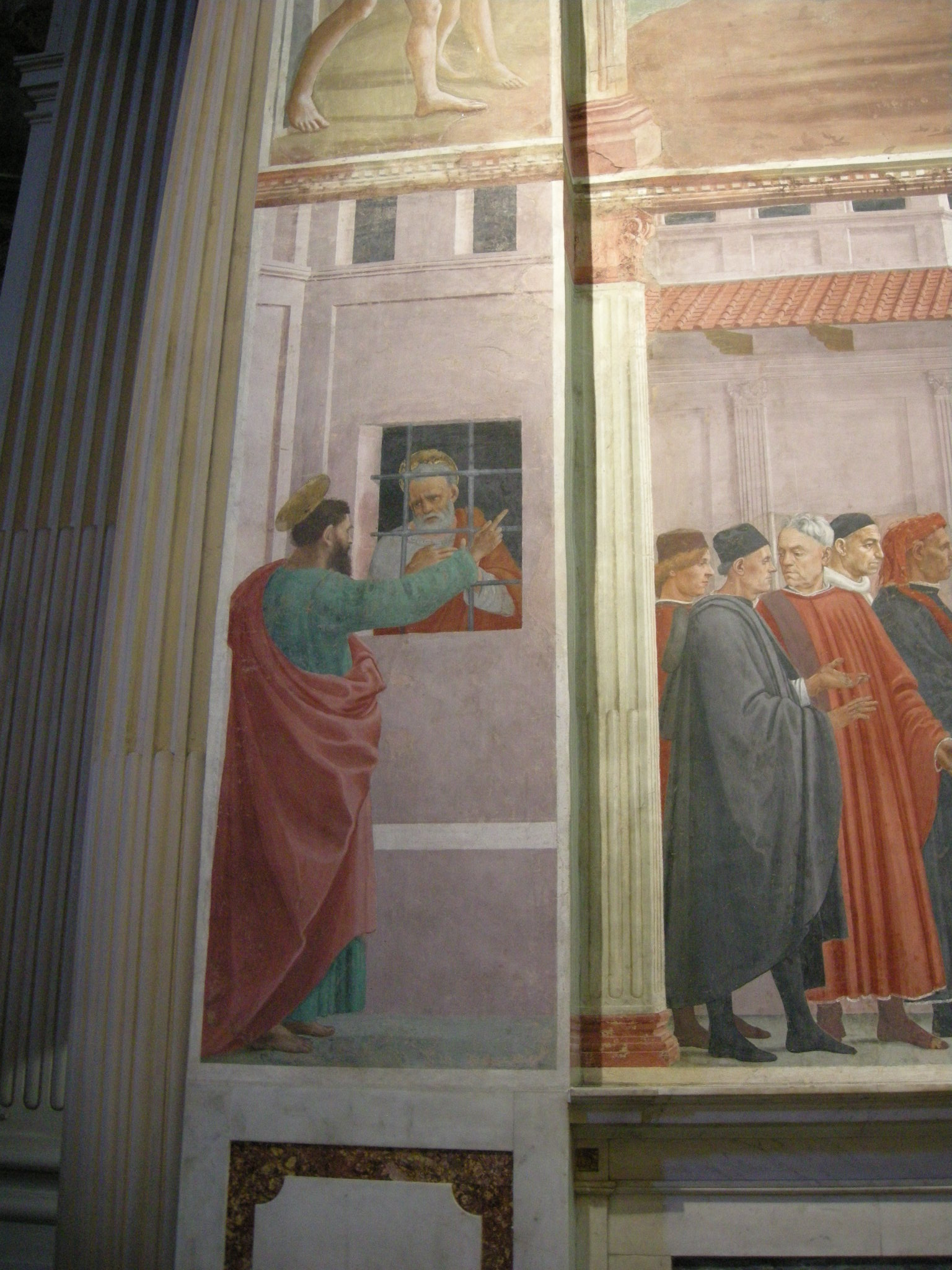 Cappella brancacci, San Pietro in carcere visitato da San Paolo